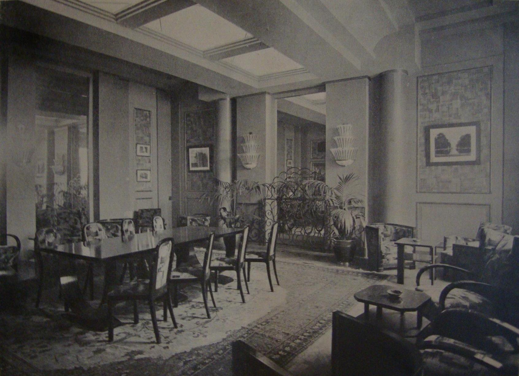 Living room original del Hotel Nogaró (hoy 562 Nogaró Hotel), a su inauguración en 1931.